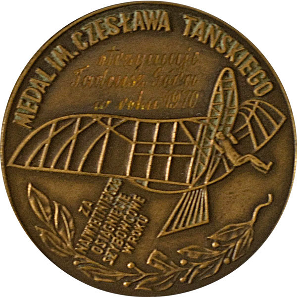 Medal należący do Tadeusza Góry nadany mu w 1970 roku. Szkoła im.Szybowników Polskich Bezmiechowa.